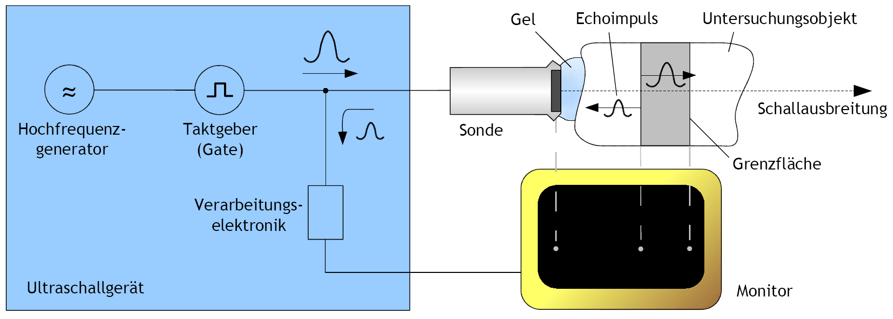 Echo-Impuls-Verfahren, Ultraschallgerät, Sonografie